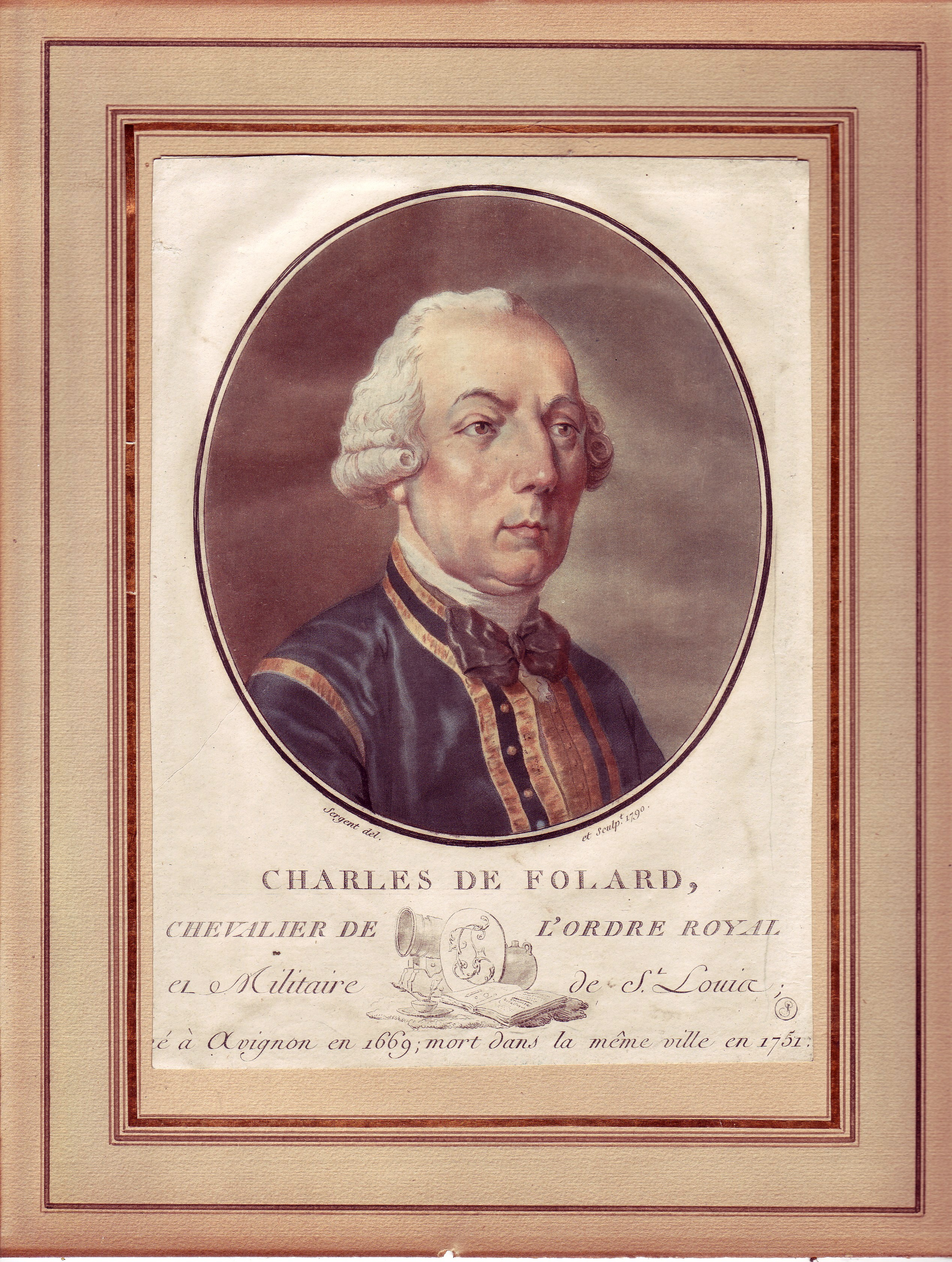 Portrait du Chevalier Charles de Folard